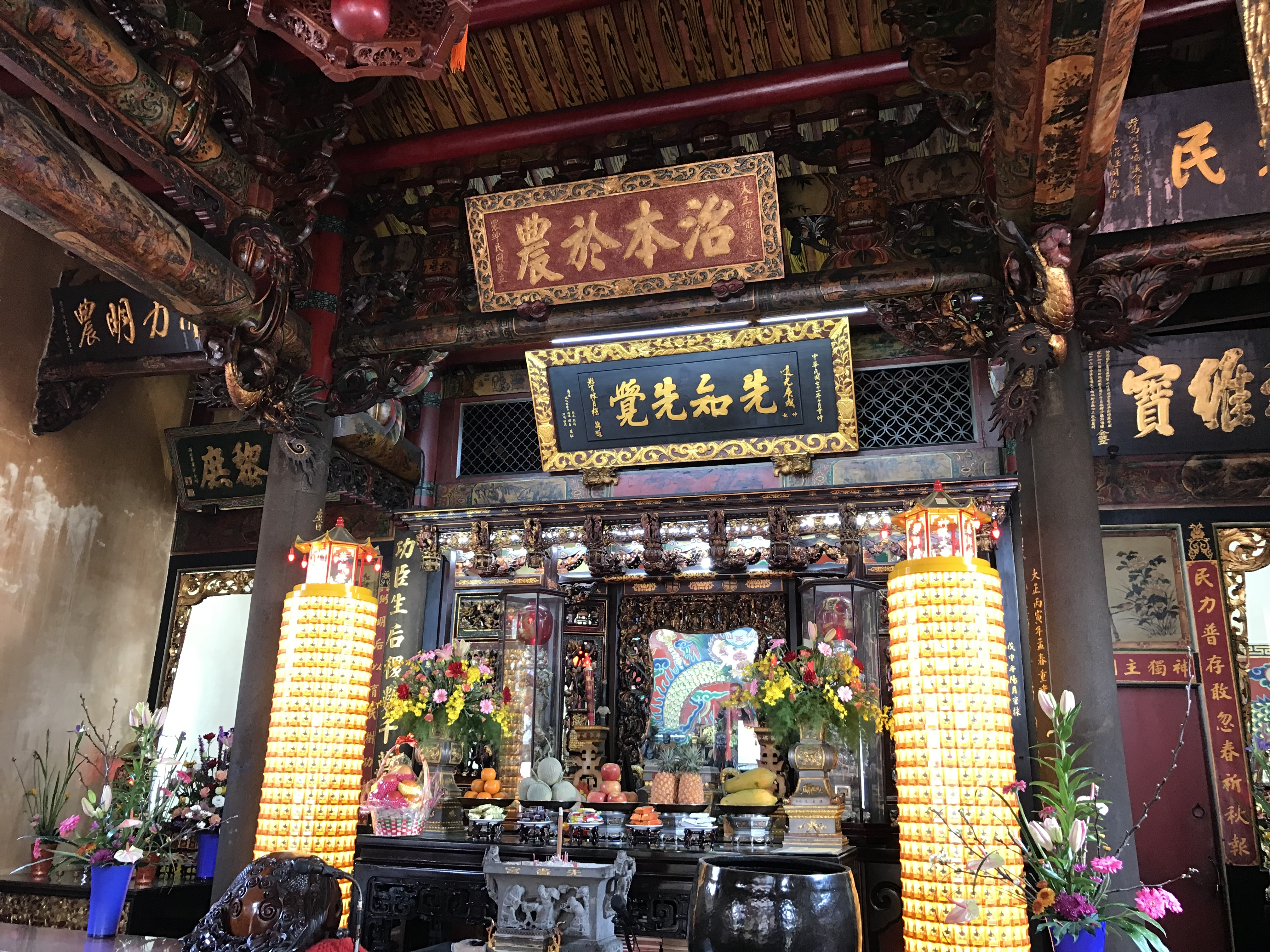 先嗇宮殿內